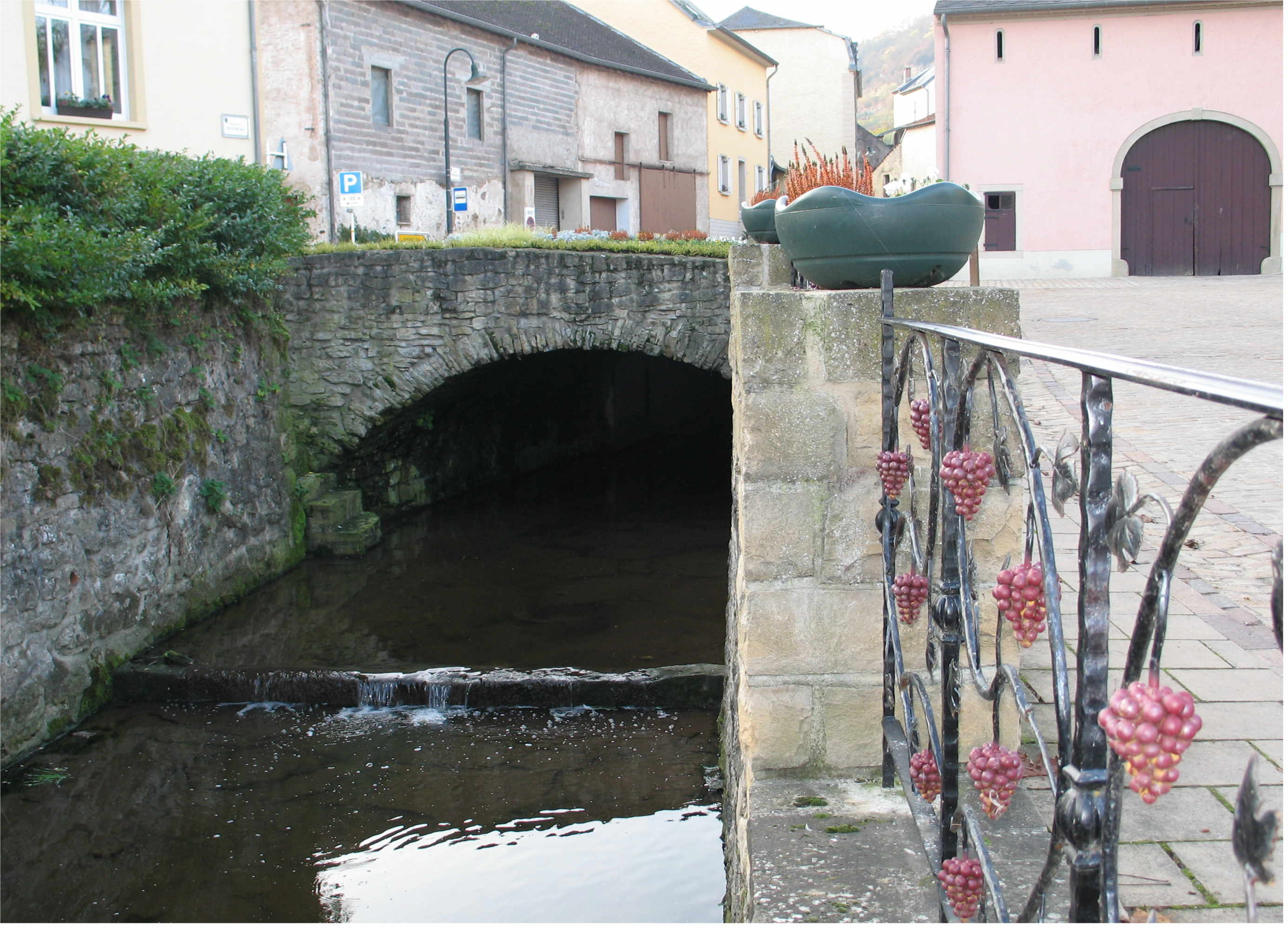 Donwerbaach zu On.